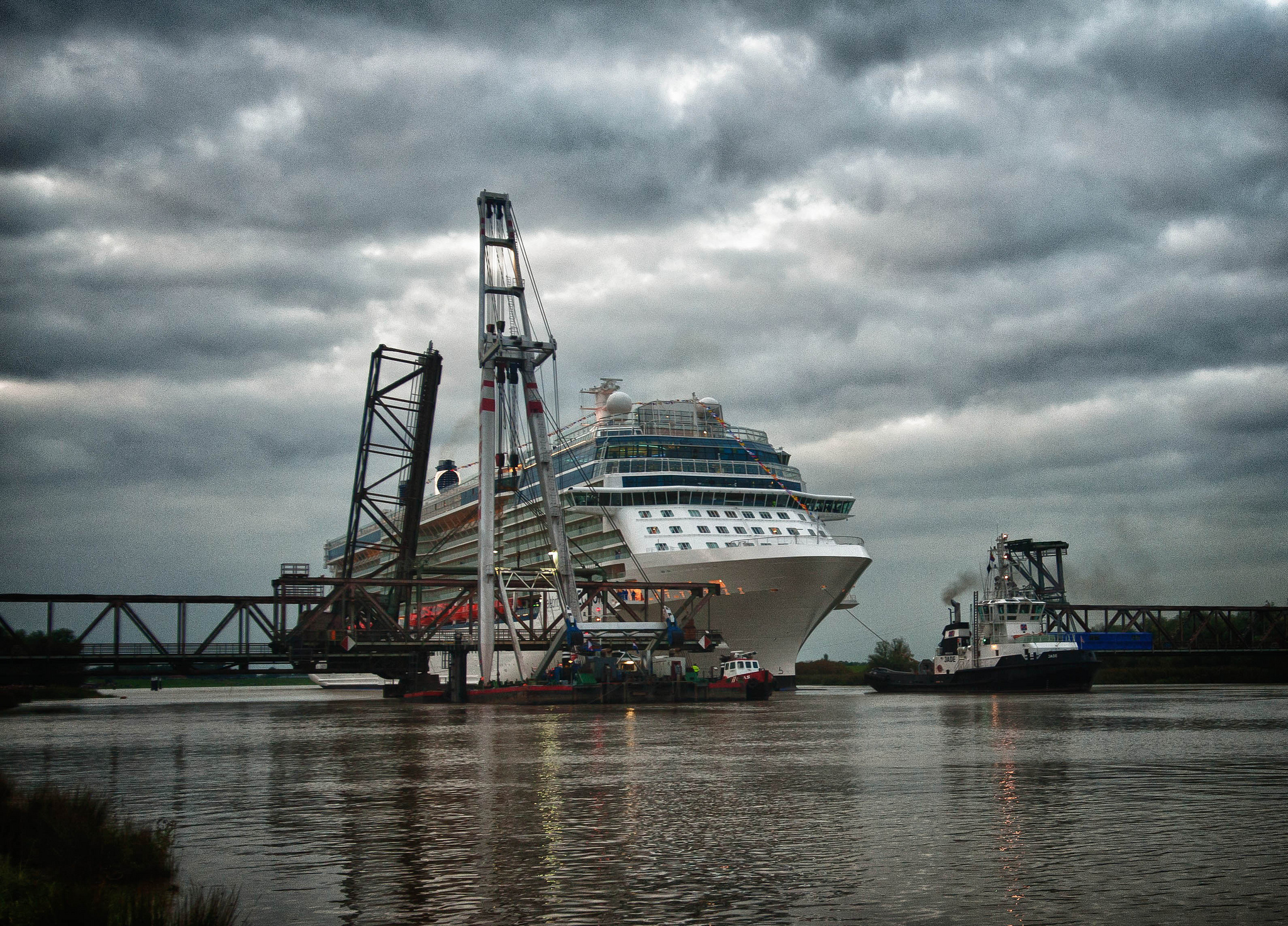 Überführung der Celebrity Reflection auf der Ems in Höhe der Friesenrücke Weener im September 2012